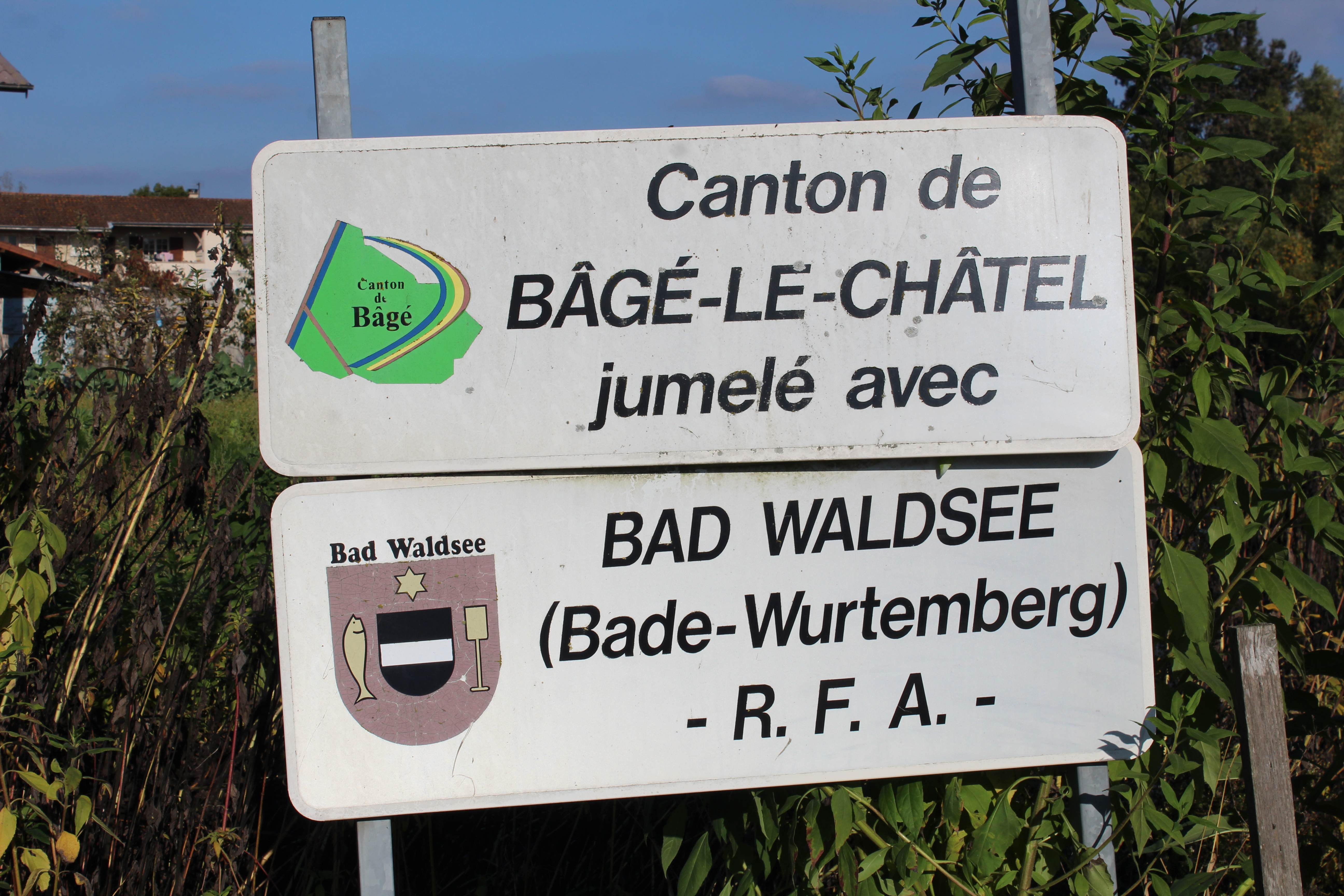 Panneau annonçant le jumelage entre le canton de Bâgé-le-Châtel et Bad Waldsee à Vésines.